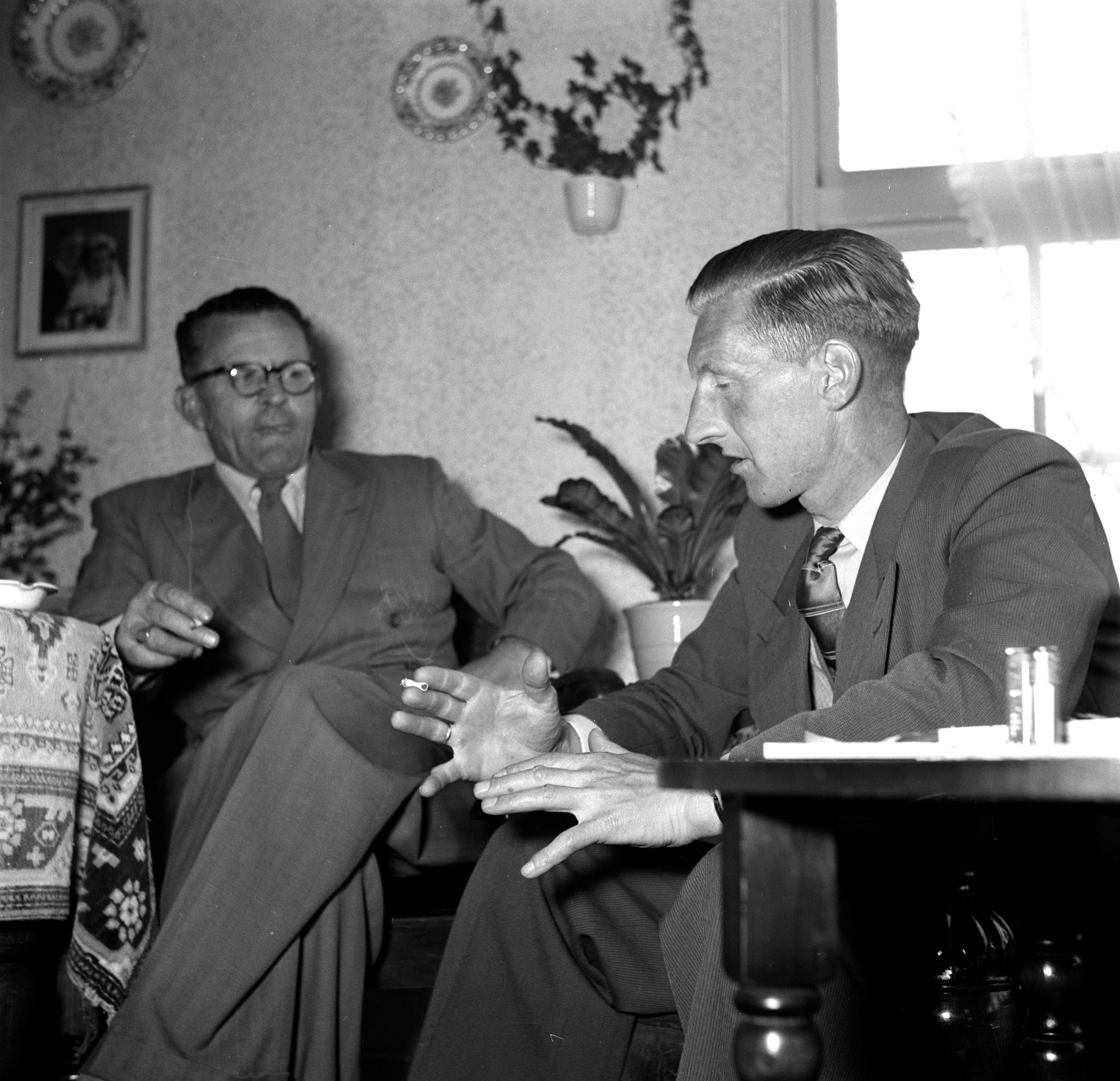 Collectie / Archief : Fotocollectie Van de Poll Reportage / Serie : [ onbekend ] Beschrijving : Gerard de Jong in gesprek met Ynse Postma, beide met een sigaret in de hand Annotatie : Gerard de Jong overleefde als enige een fusillade op 7 april 1945 bij Dronrijp. Ynse Postma verleende De Jong eerste hulp en hielp bij diens transport naar een onderduikadres Datum : 1 januari 1955 Locatie : Friesland, Leeuwarden Trefwoorden : EHBO, bezoekers, gesprekken, hulpverlening, interieurs, onderduikers, roken, sigaretten, woningen Persoonsnaam : Jong, Gerard de , Postma, Ynse Fotograaf : Poll, Willem van de Auteursrechthebbende : Nationaal Archief Materiaalsoort : Negatief (6x6) Nummer archiefinventaris : bekijk toegang 2.24.14.02 Bestanddeelnummer : 254-3333